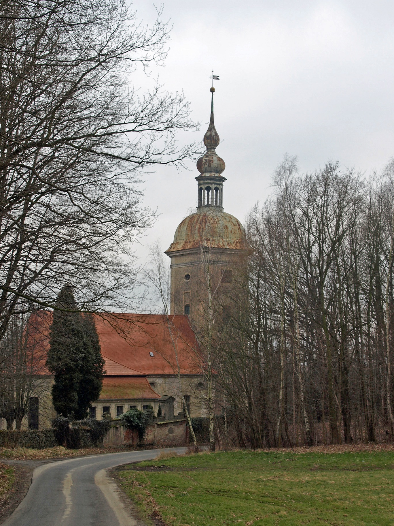 Kirche in Nida (Niedów)